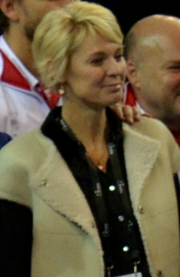 Petra Černošková, née Petra Langrová, firstly married Petra Píchalová-Langrová, a former tennis player from Czech Republic in November 2016